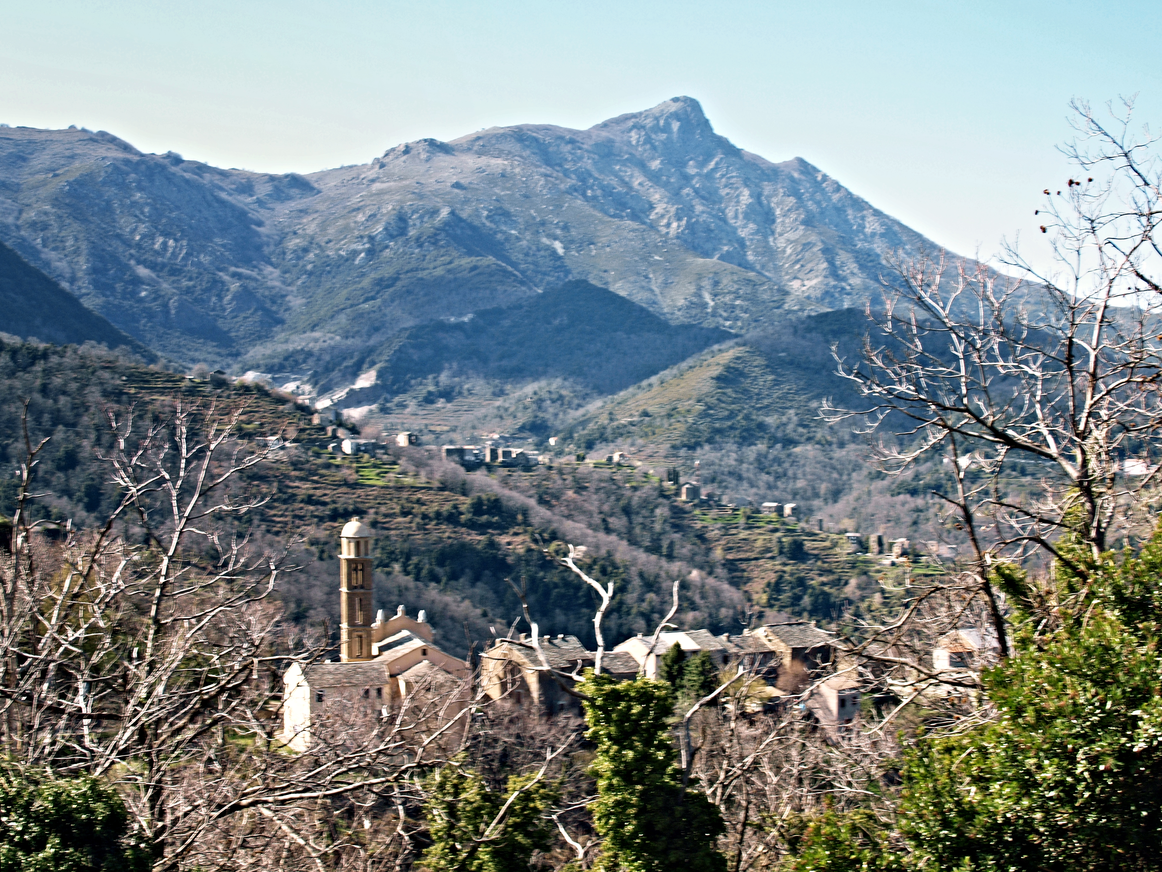 Carpineto, Castagniccia (Corse) - Vue du village. En arrière-plan, le village de Carcheto et le monte San Petrone